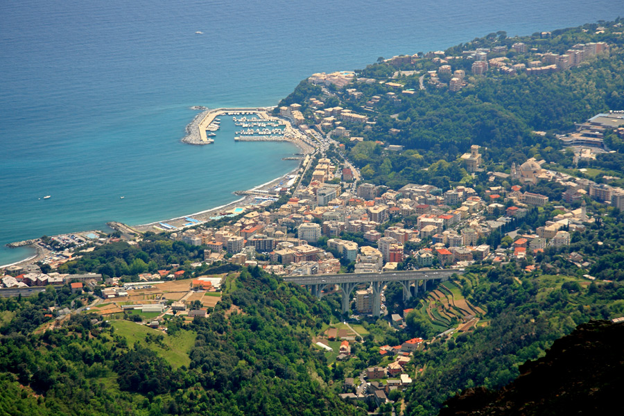 Panorama su Arenzano dalla cresta del Monte Tardia (m 928)